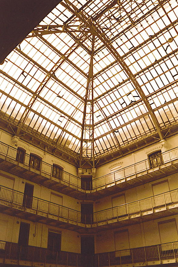 Familistère te Guise - deel van de glazen koepel over het binnenplein van het centrale gebouw - eigen foto - april 2004